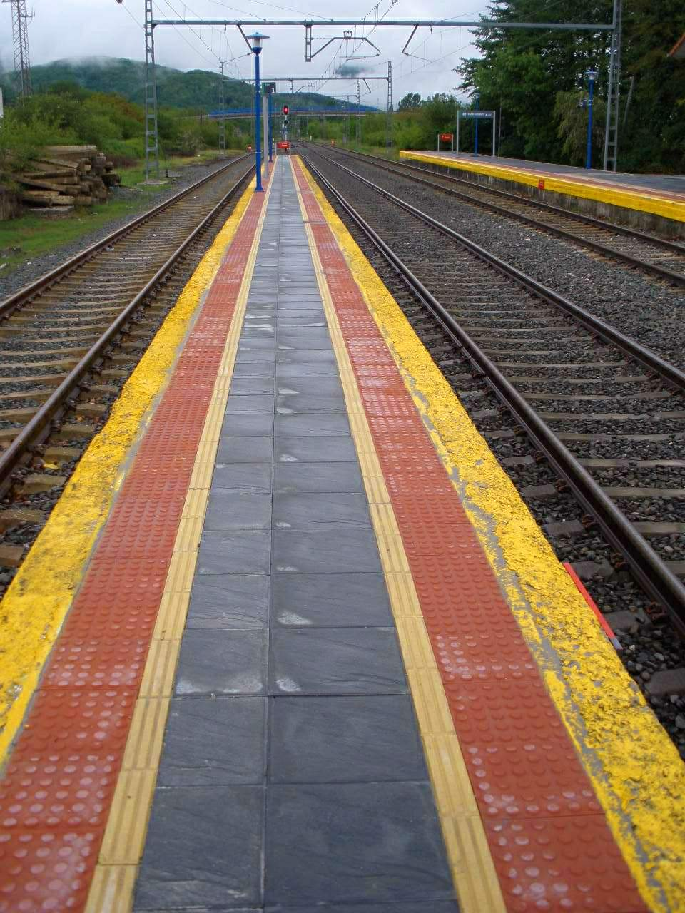 Estación de Echarri-Aranaz (Navarra)